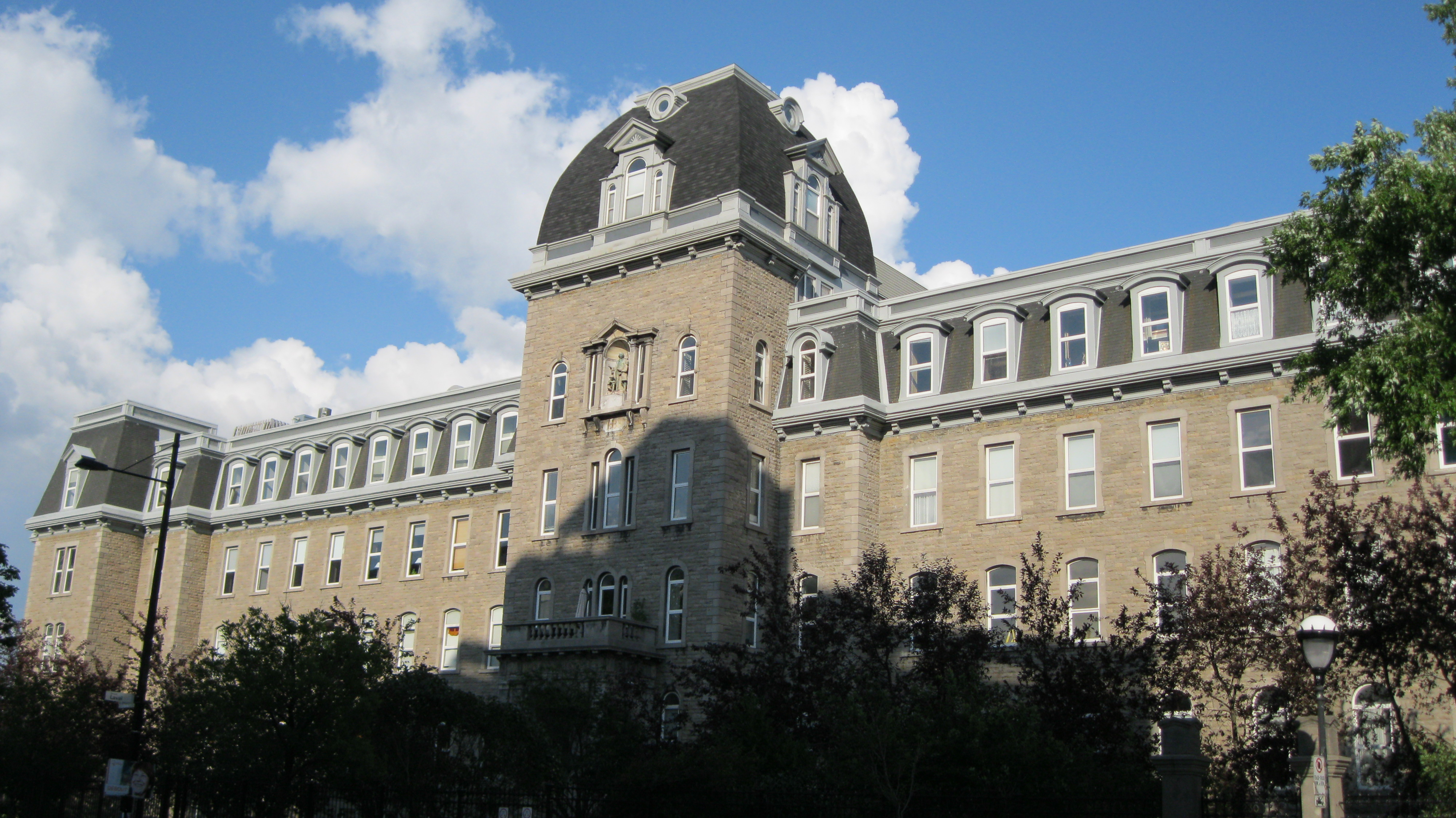 Ancien collège du Mont-Saint-Louis, 230 rue Sherbrooke Est, Montréal